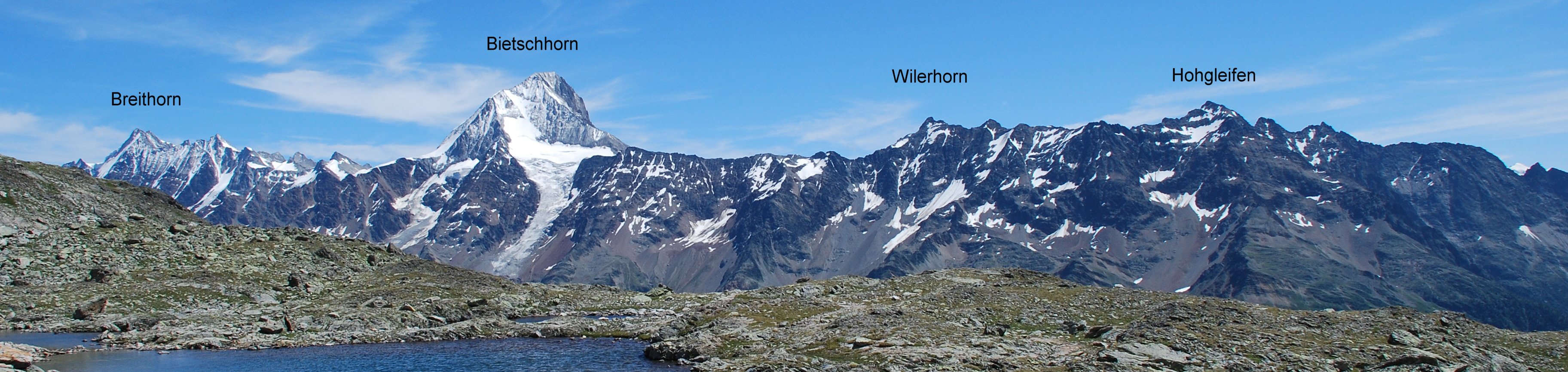 en.: Bietschhorn-panorama at Lötschental, Switzerland; dt.: Bietschhorn-Kulissse im Lötschental, Schweiz (mit Beschriftung)